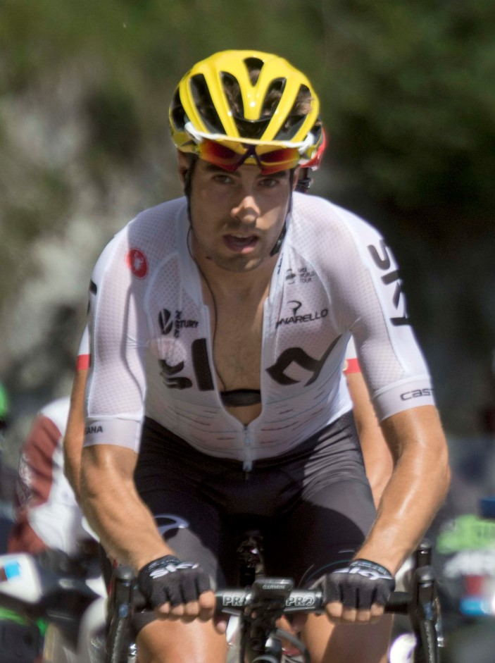 14-7_1 landa